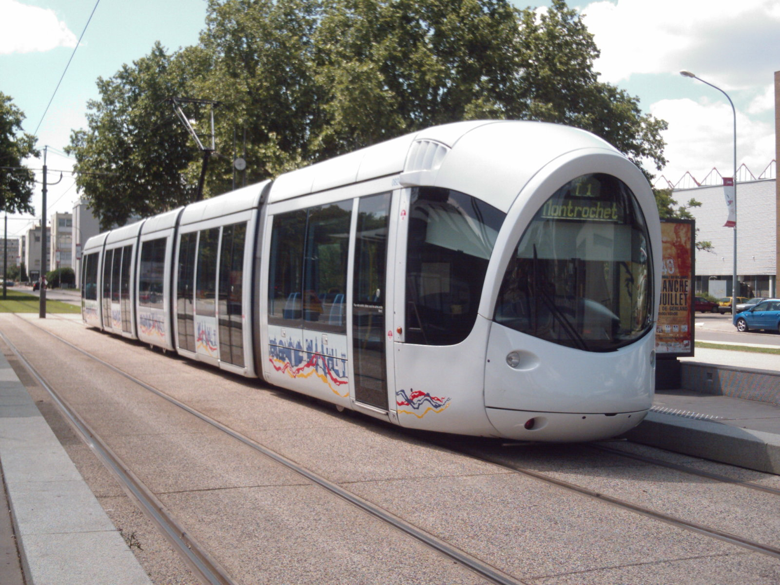 Tramway de Lyon